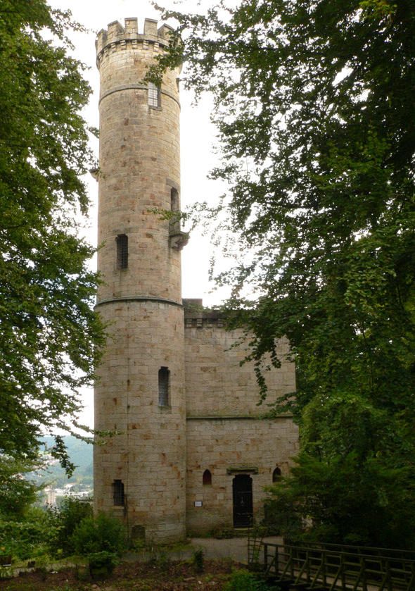 Tillyschanze Hann. Münden